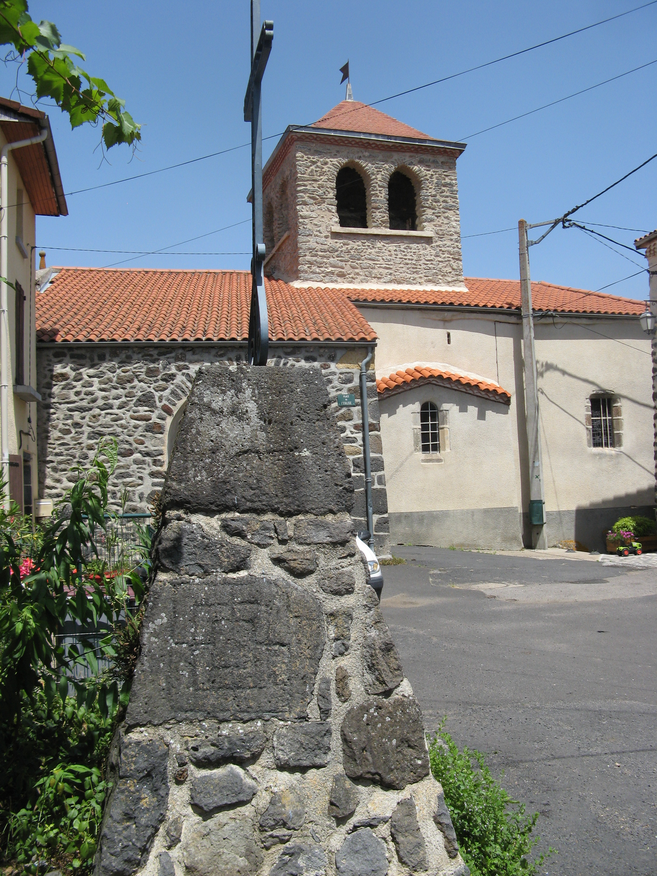 Bergonne, église et croix sur le socle de laquelle figure un labyrinthe.